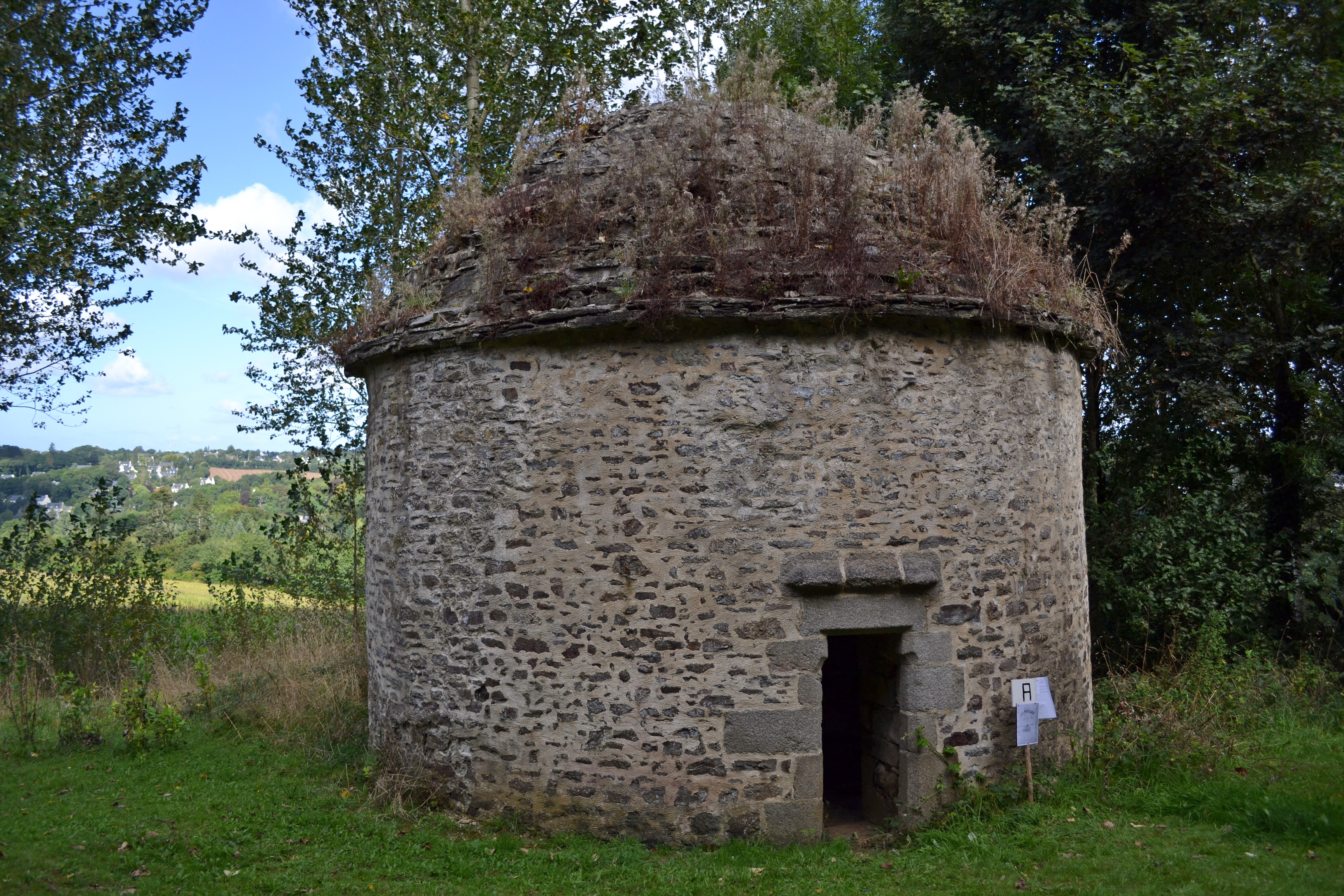 Pigeonnier du château de Lesquiffiou du XVIe siècle à Pleyber-Christ (Finistère). .